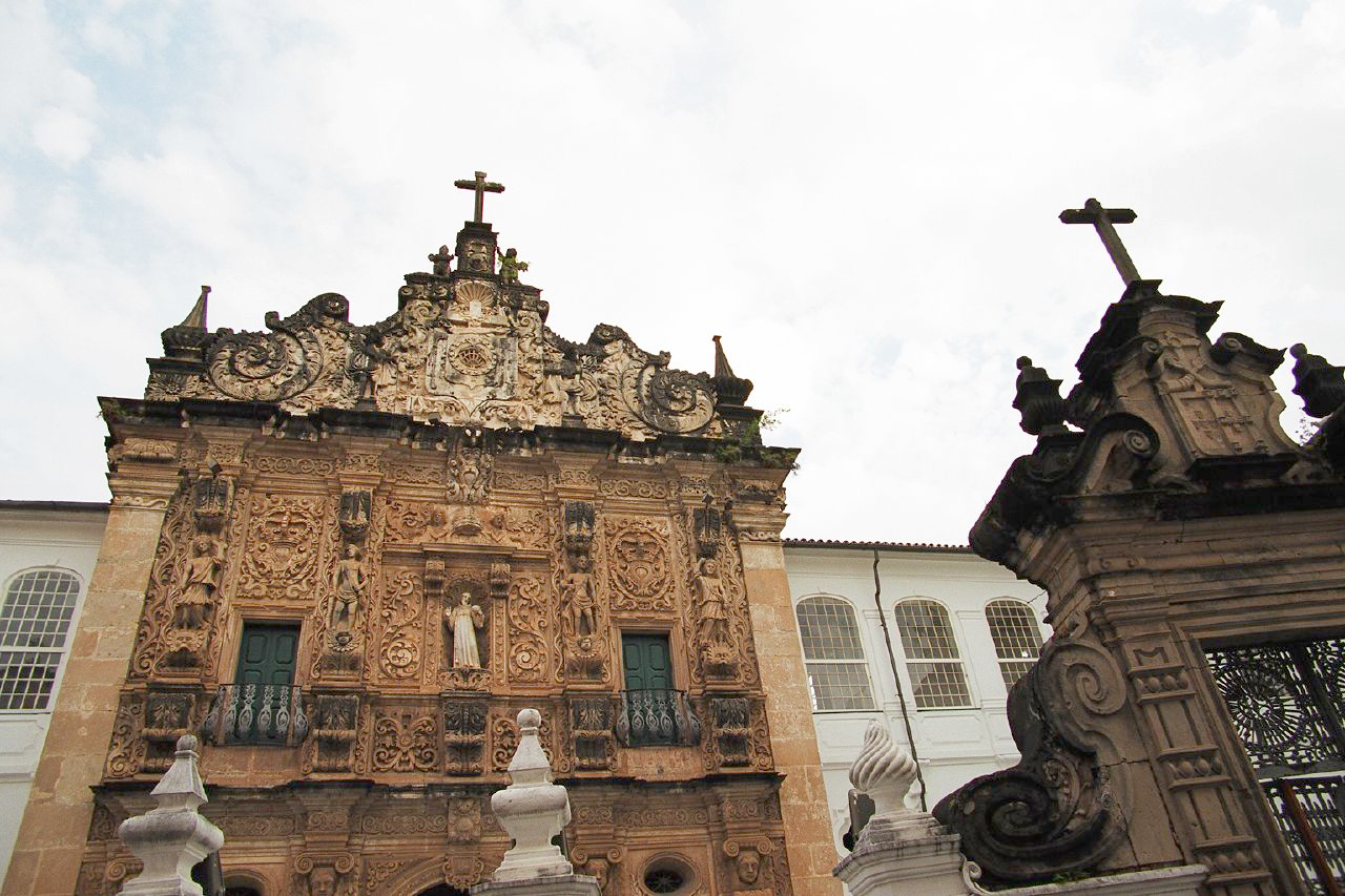 Church of the Ordem dos Terceiros de Sao Francisco in Salvador, Bahia, Brazil